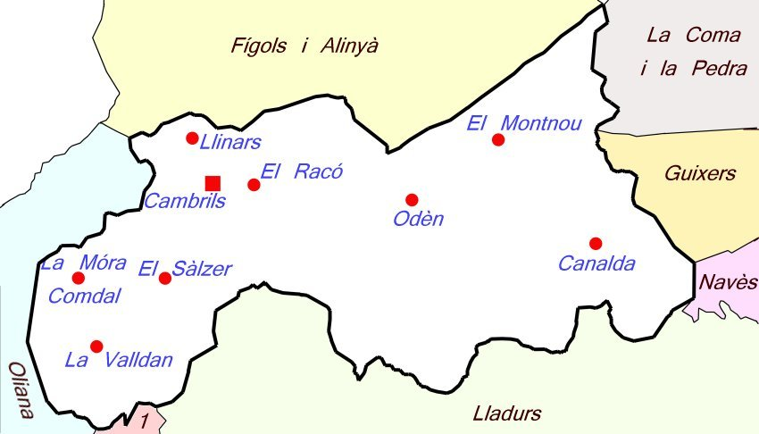 Mapa del municipi d'Odèn (Solsonès) amb els municipis limítrofes i les entitats de població